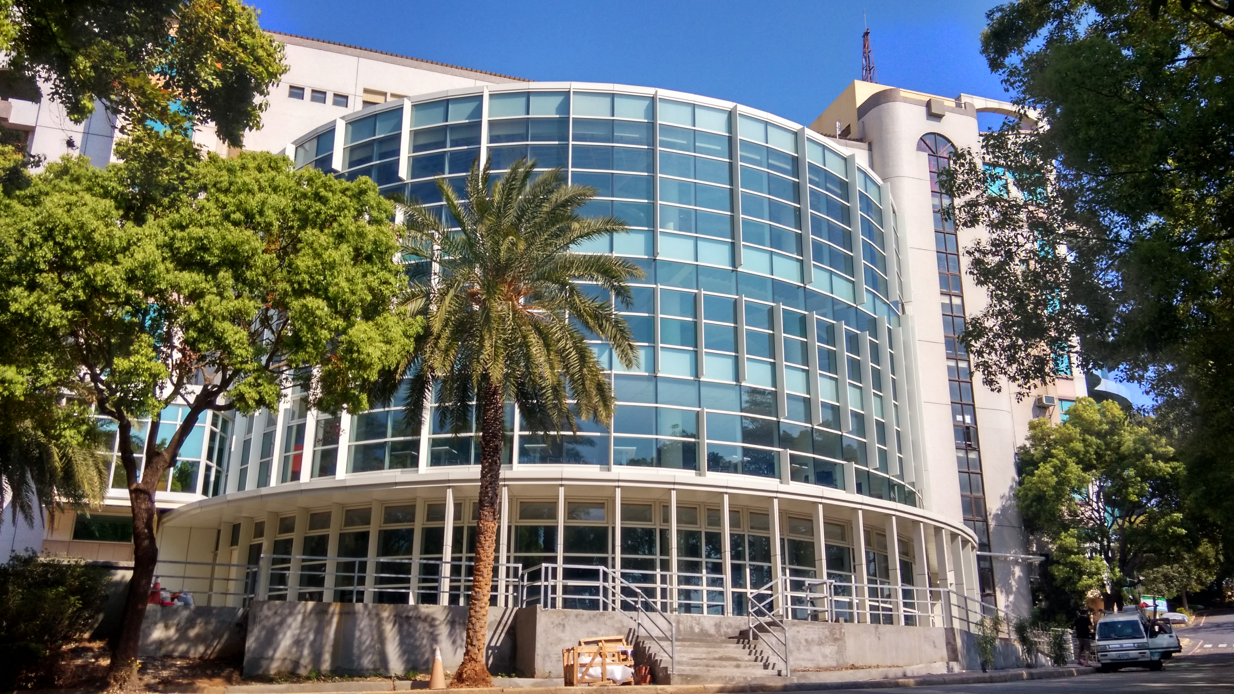 中文（台灣）: 建國科大生活美育館